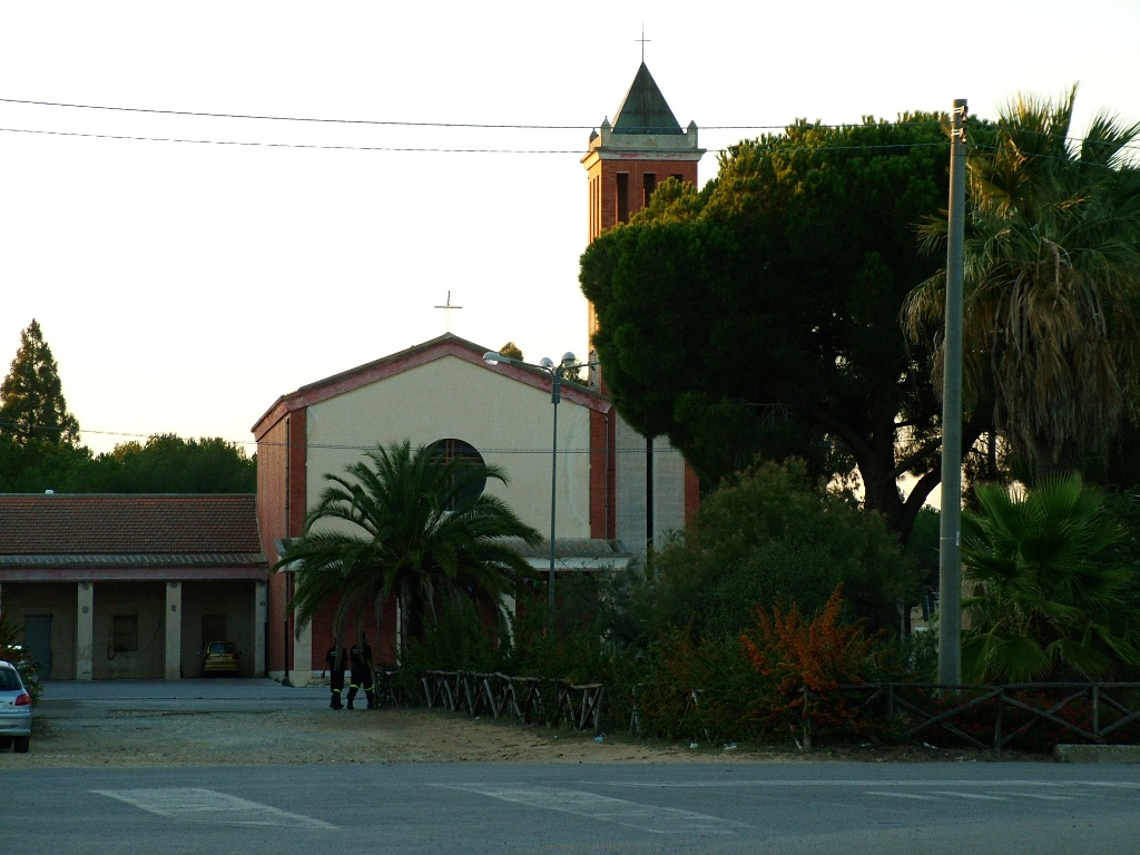 Rosario Vizzini Chiesa nella frazione Santo Pietro di Caltagirone